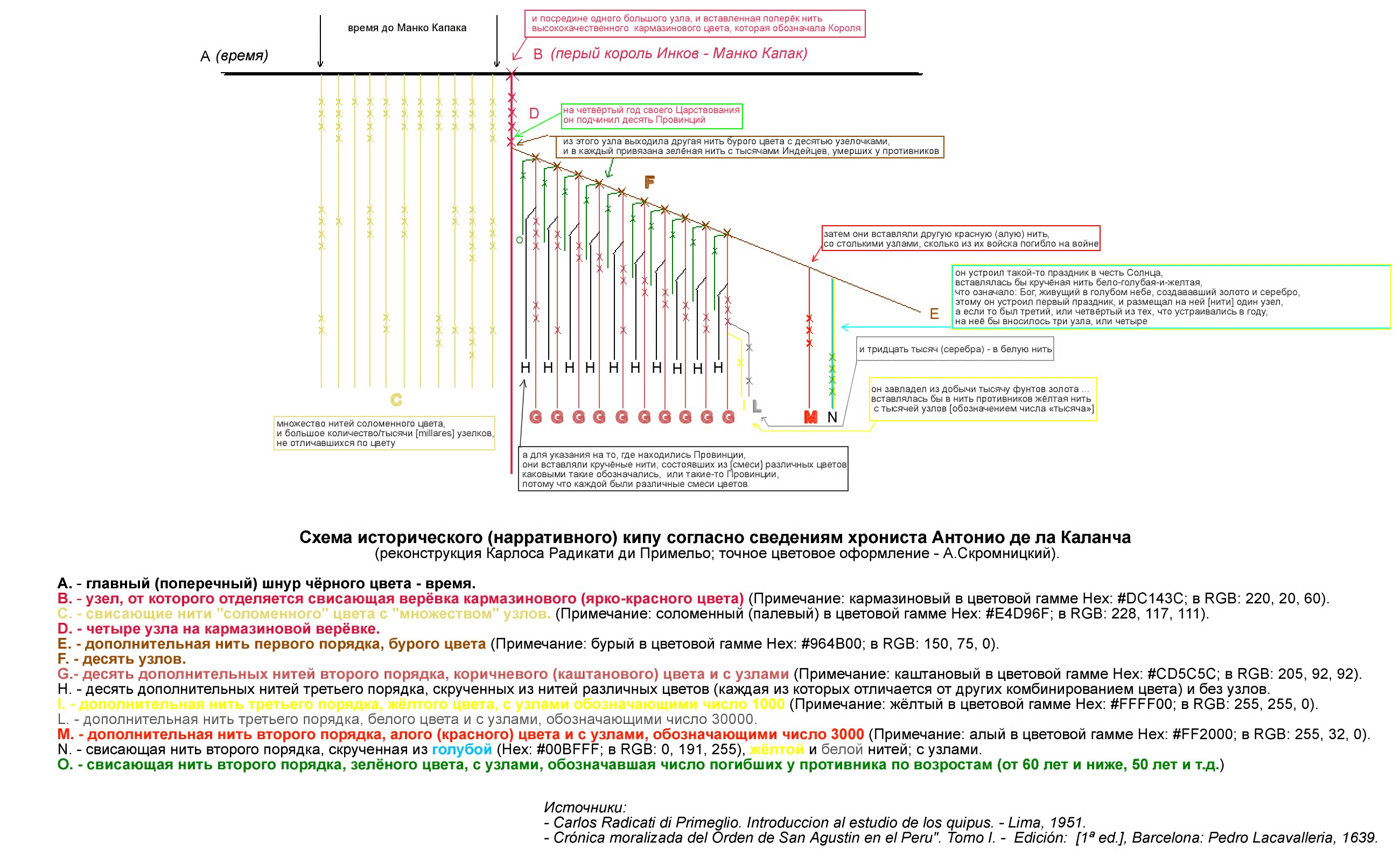 Esquema del Quipu de Antonio de la Calancha por Carlos Radicati di Primeglio y A.Skromnitsky